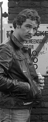 Thom Hoffman in aflevering Het eindexamen van de Nederlandse dramaserie De Lemmings in 1980